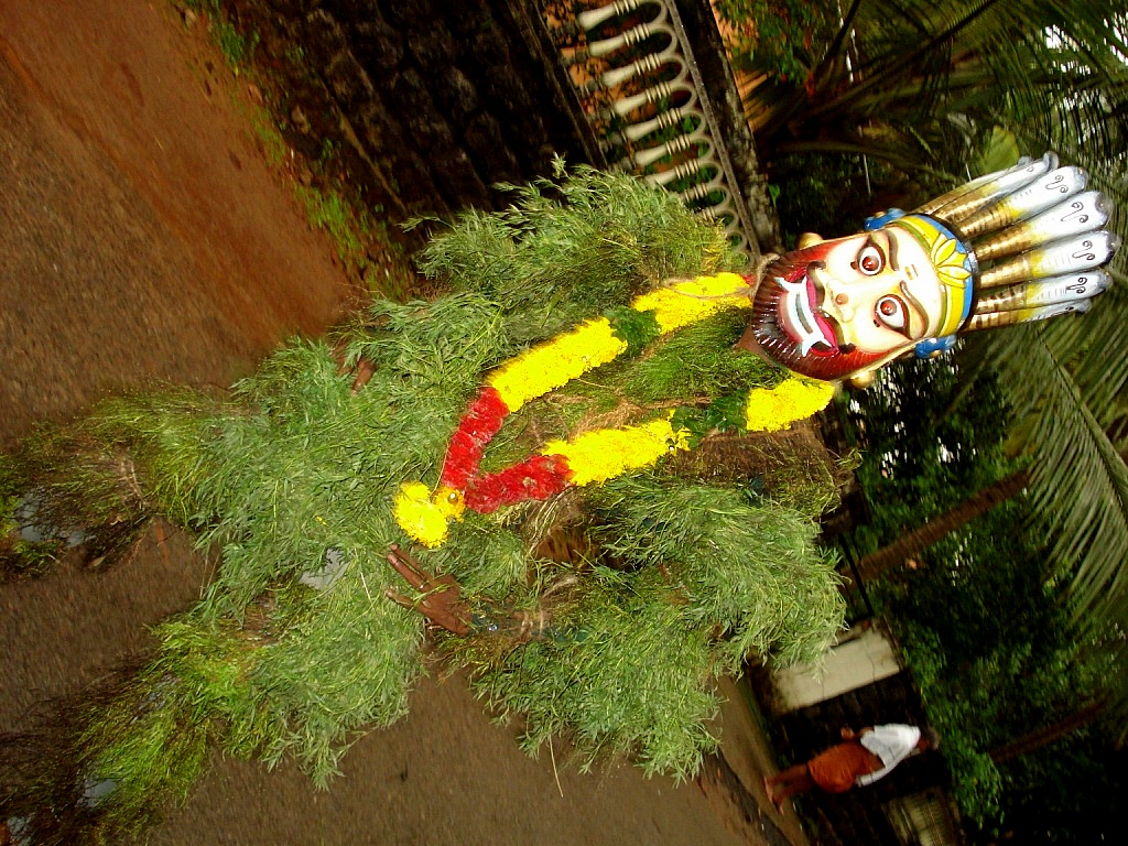 Kummattikali